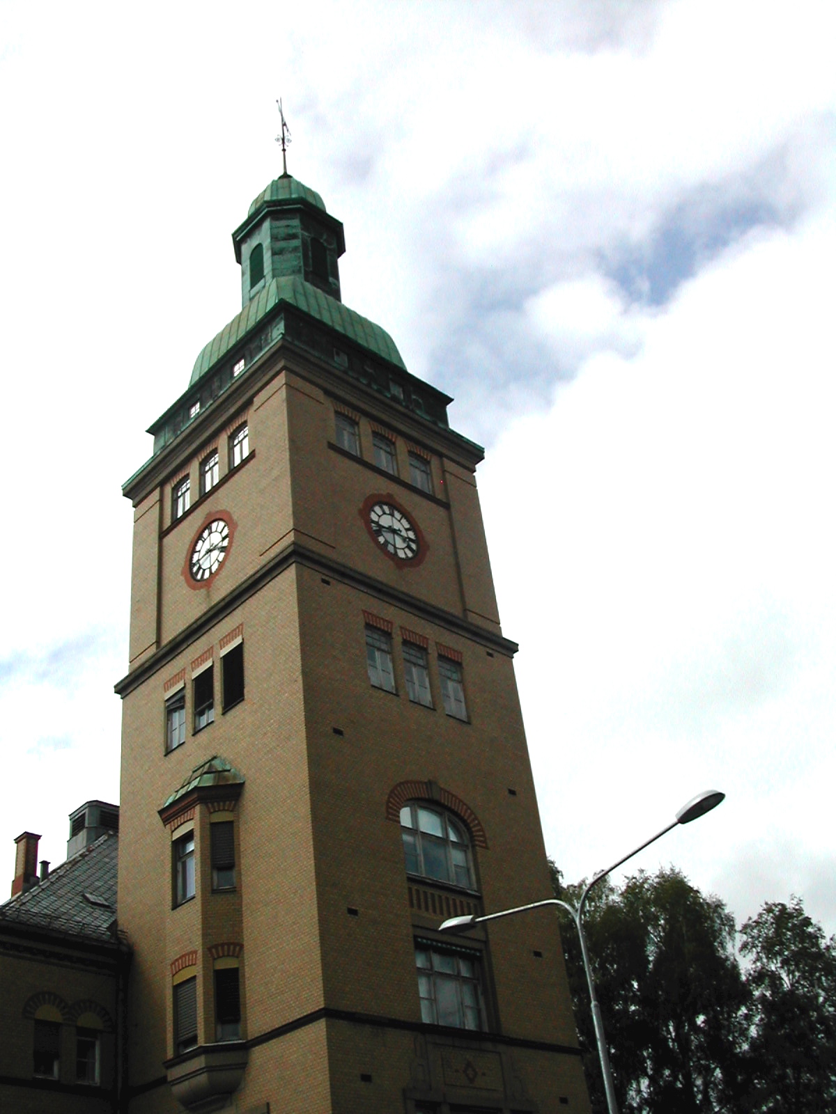 Oslo universitetssykehus, Ullevål (Oslo University Hospital, Ullevål)